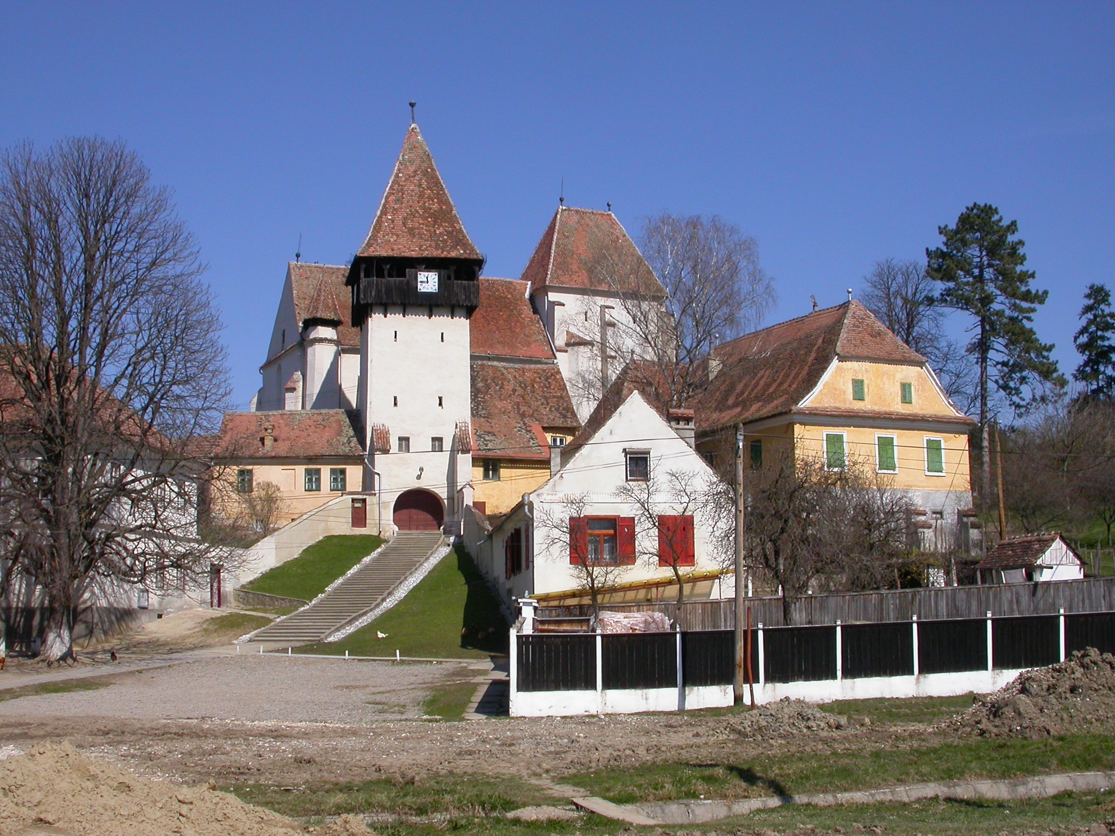 Ansamblul bisericii evanghelice fortificate, sec. XIV - XVI